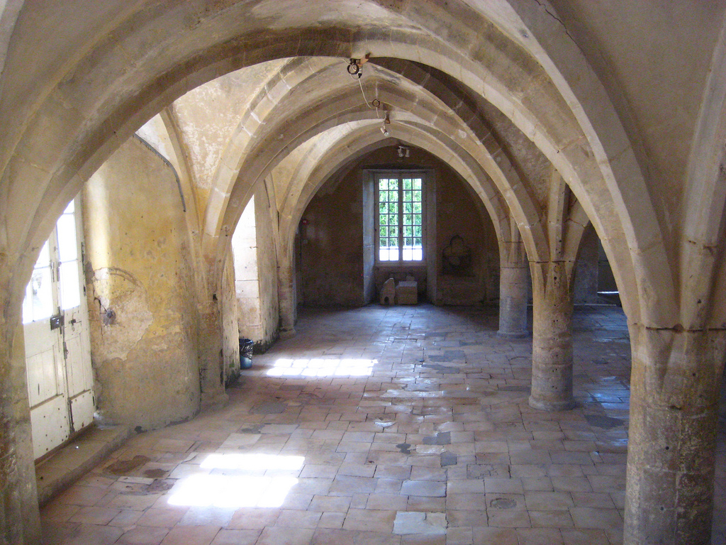 réfectoire des moines du prieuré Saint-Gabriel à Saint-Gabriel-Brécy dans le Calvados (Basse-Normandie, France).